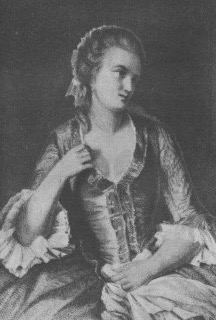 Marie-Thérèse-Amélie Caron de Beaumarchais geb. Villermaula(z), Vuillermaula(z) oder Willermaulaz (1751–1816), von Charmey (Freiburg), seit 1774 Geliebte, seit 1786 dritte Ehefrau von Pierre-Augustin Caron de Beaumarchais (1732–1799), Mutter von Amélie-Eugénie Delarue geb. Caron de Beaumarchais (1777–1832).